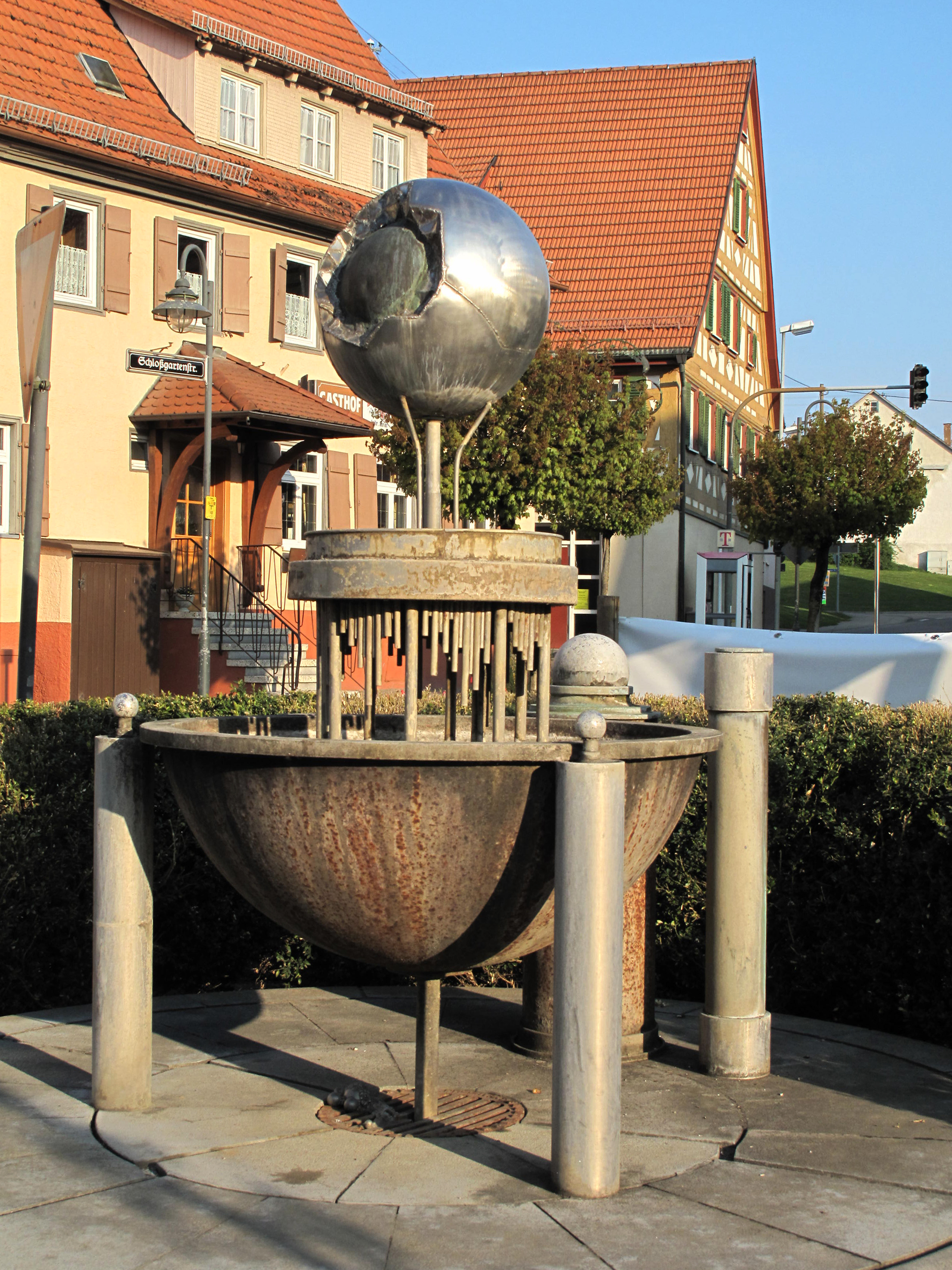 Lutz Ackermann, Brunnen, 1990, - Deutschland, Baden-Württemberg, Mötzingen, Rathaus